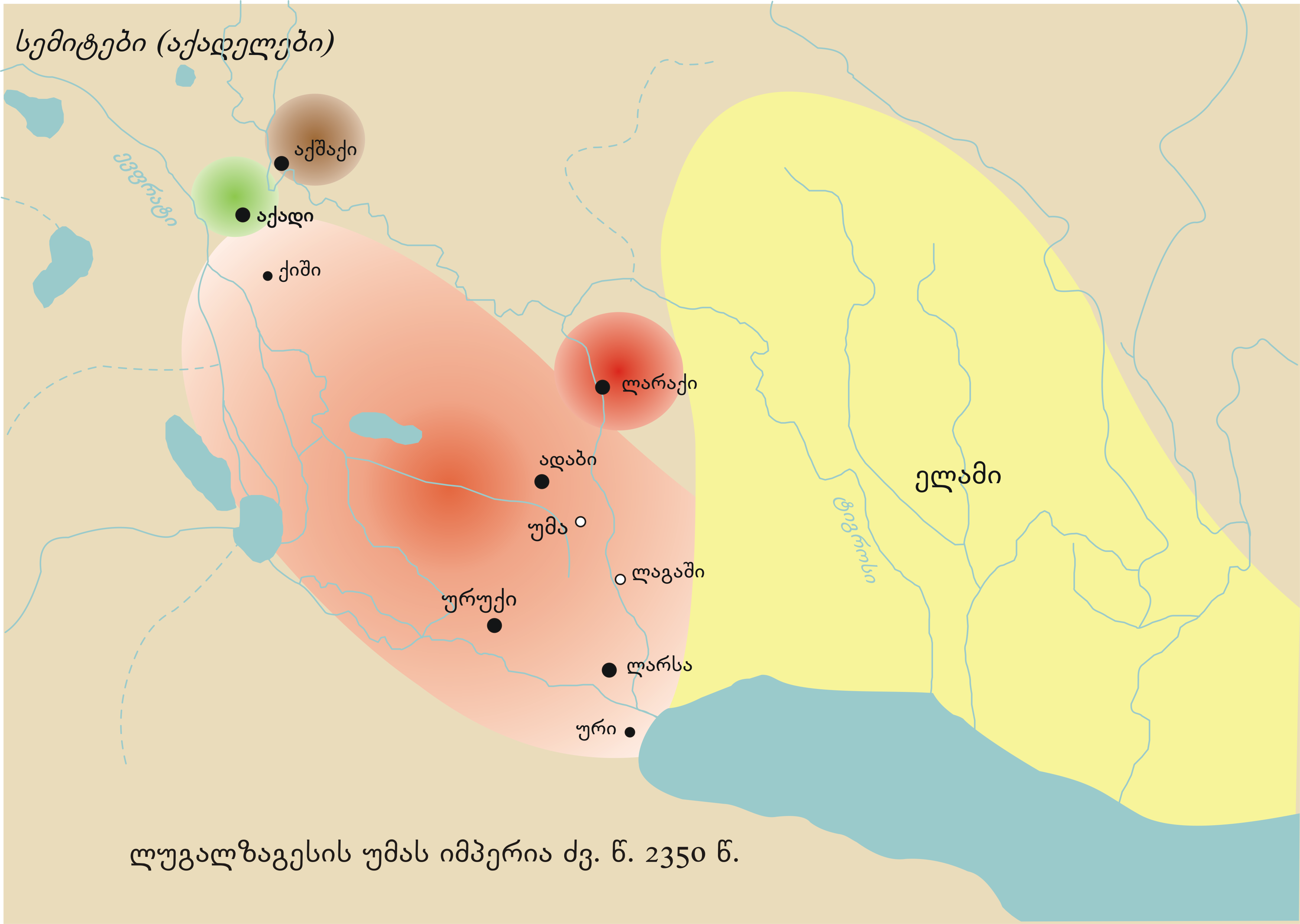 ლუგალზაგესის უმას იმპერიის რუკა